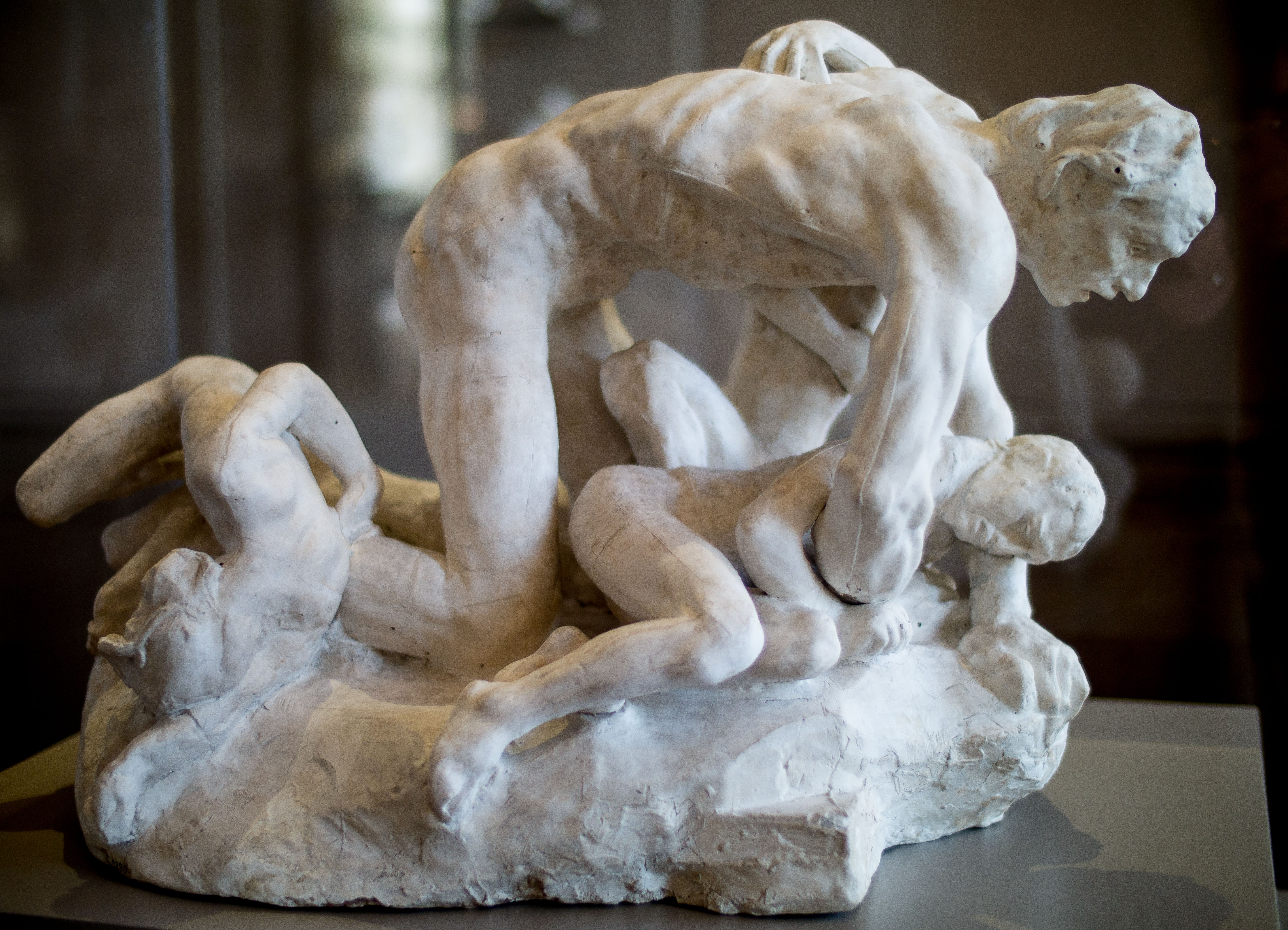 Auguste Rodin, "Ugolin et ses enfants", vers 1882, Sculpture (plâtre), Musée Rodin, Paris, France